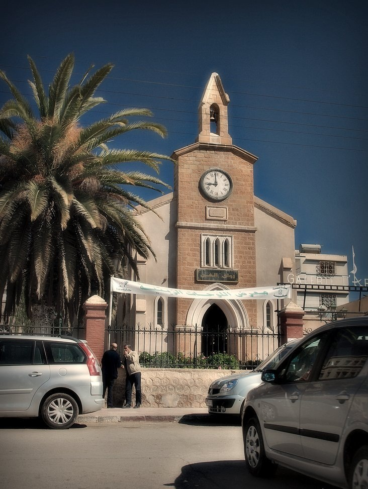 Ancienne église devenue une galerie d'art (Riwaq el-Fen)